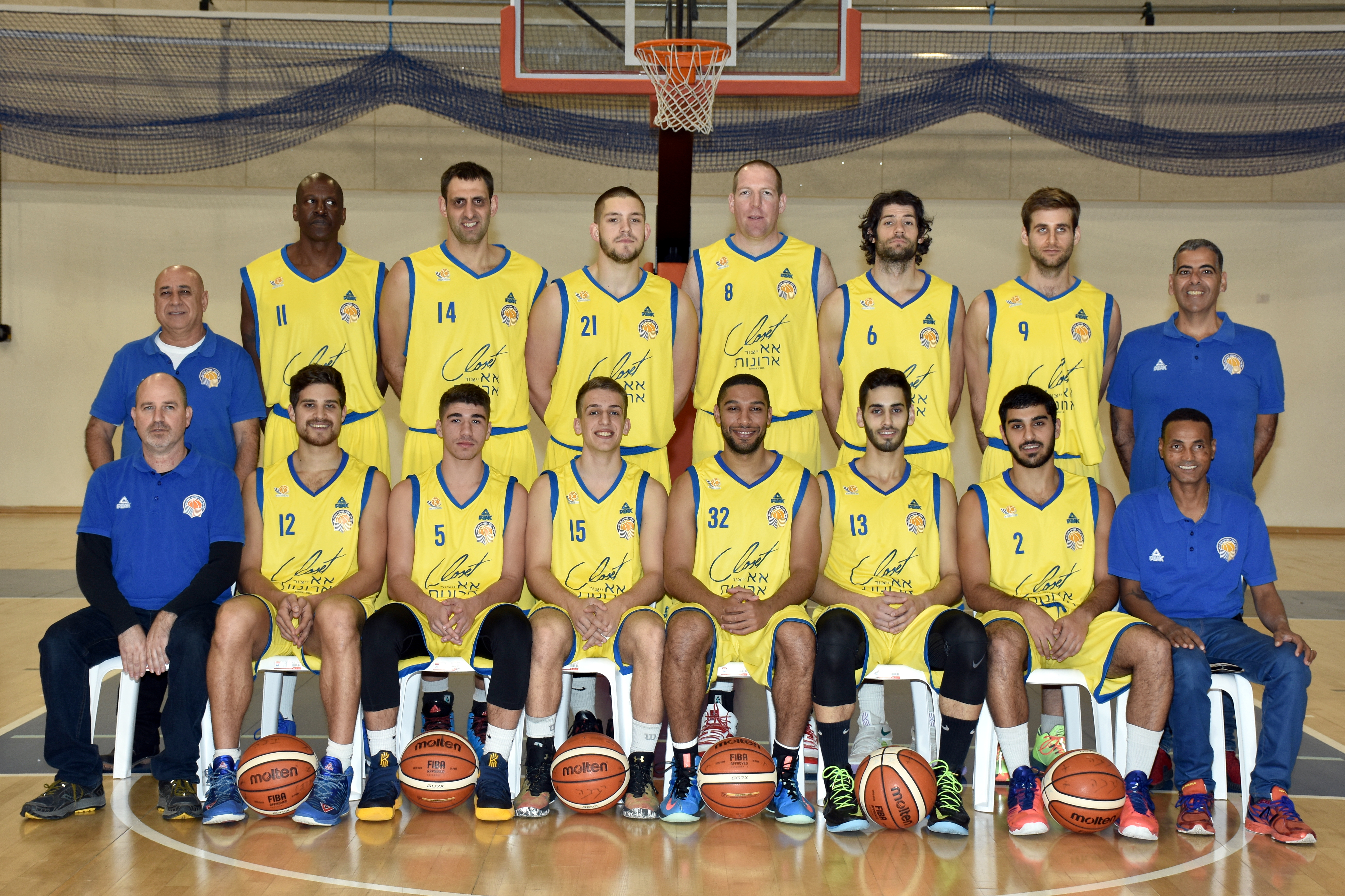 אליצור יבנה 2017